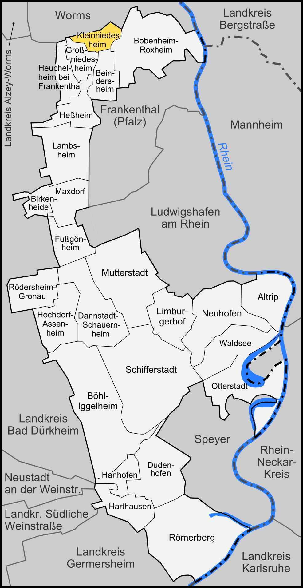 Karte der Gemeinde Kleinniedesheim im Rhein-Pfalz-Kreis